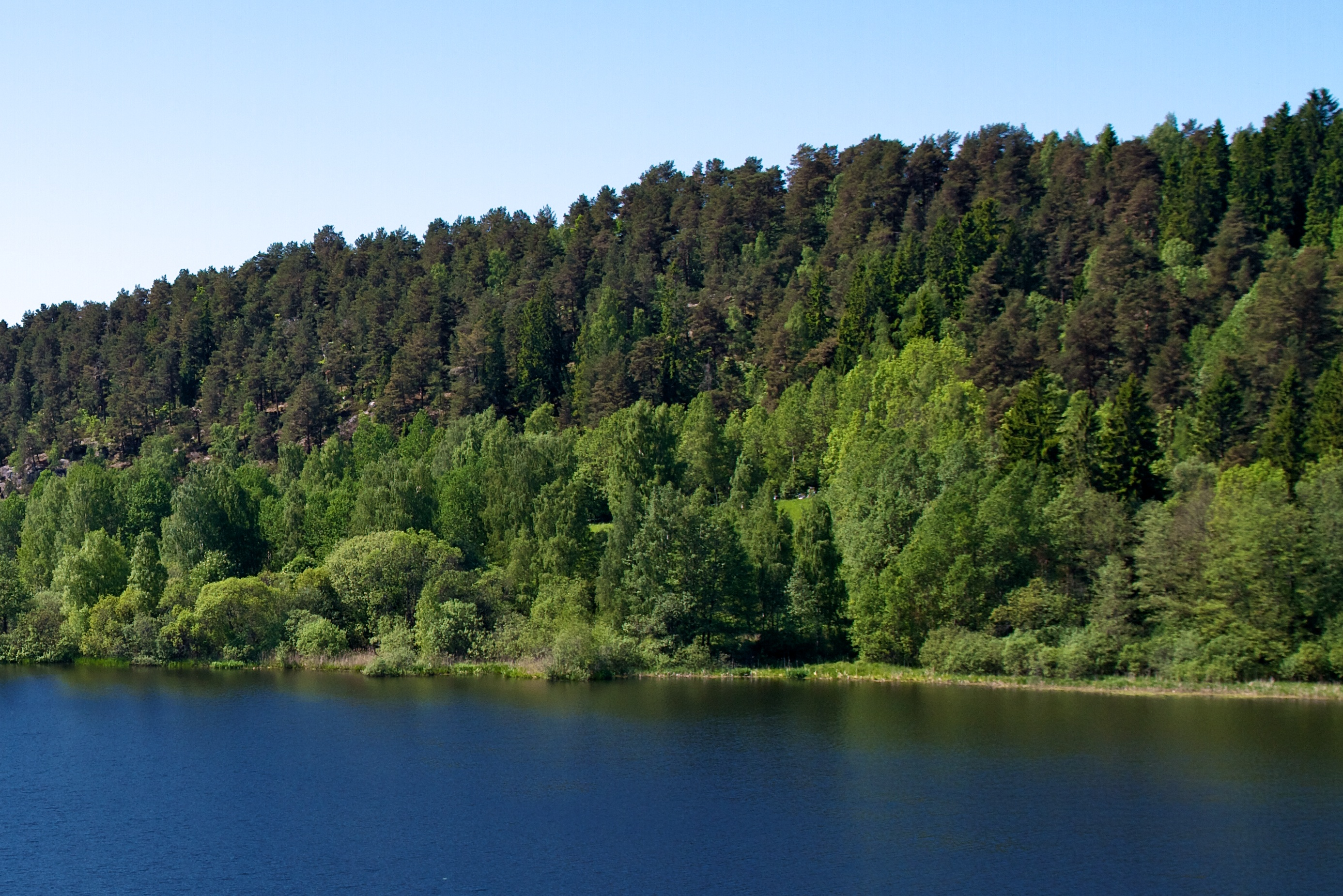 Tallberget i Bydel Østensjø i Oslo. Østensjøvannet i forgrunnen.